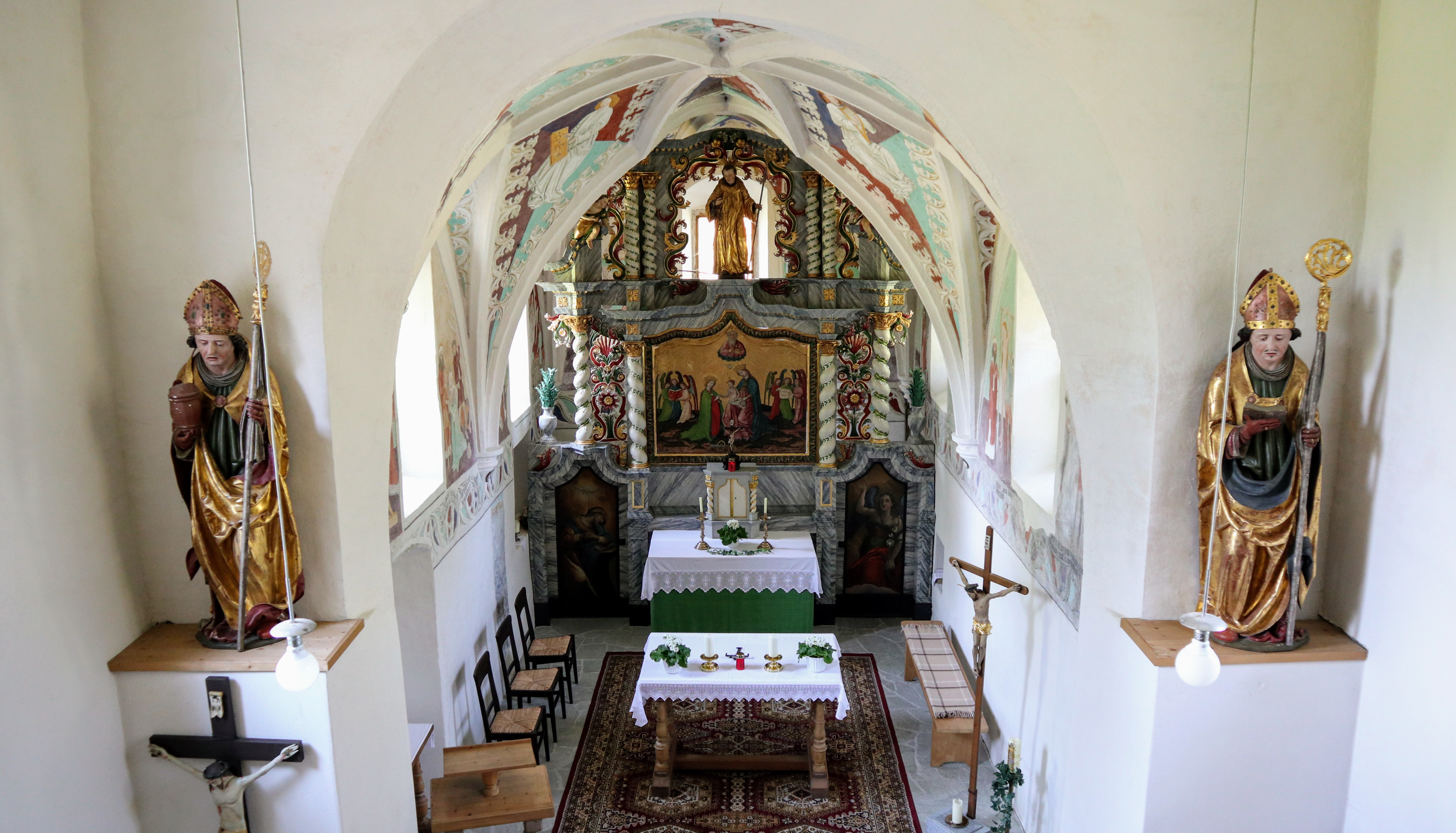 Kath. Filialkirche hll. Katharina und Leonhard, Dornbach, Gemeinde Malta (Kärnten). Kircheninneres, Blick von Empore